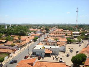 foto Altos PI